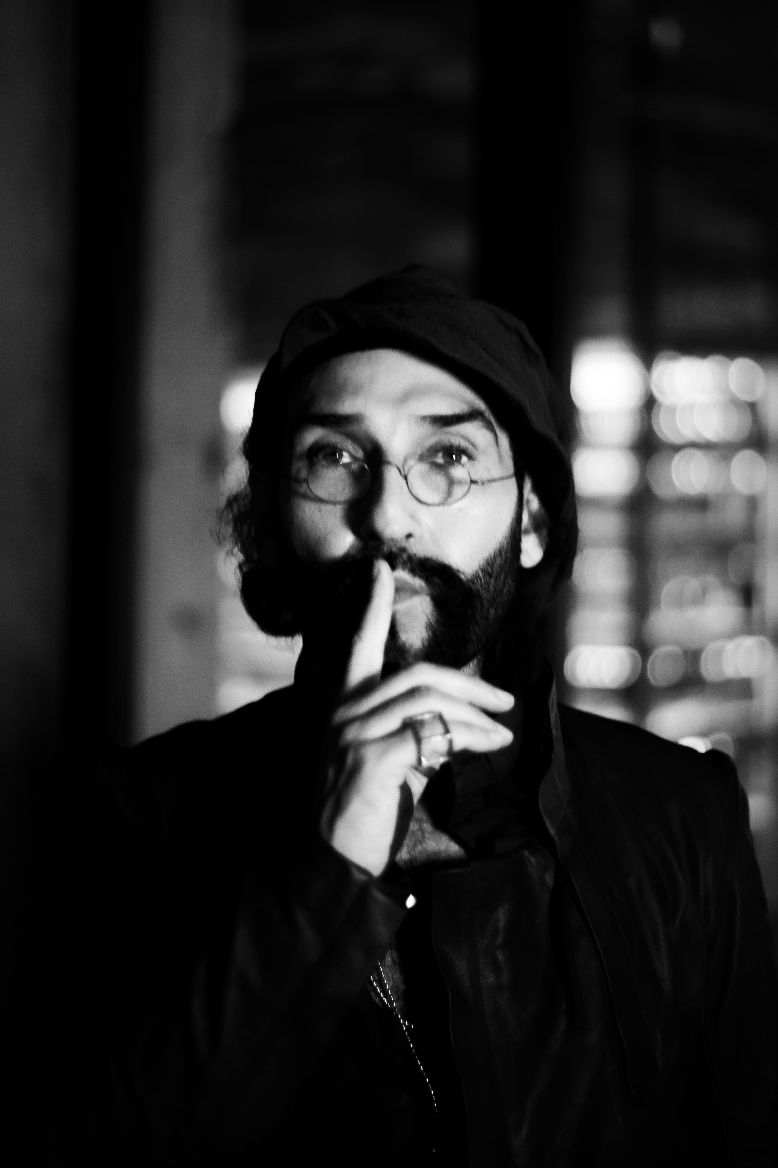 این عکس ها توسط پوریا افخمی در هتل استامبا واقع در شهر تفلیس کشور گرجستان ثبت شده است